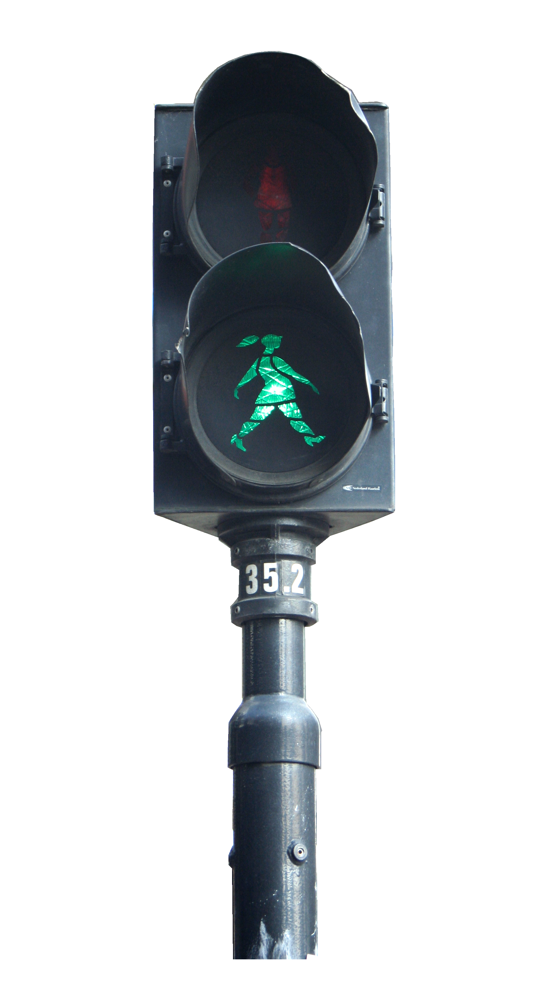 Oversteeklicht groen